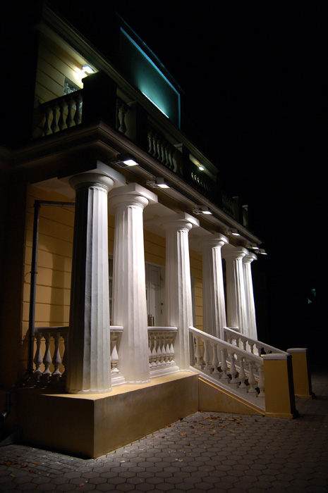 Беларуская (тарашкевіца): Былы маёнтак «Паліўнічы маёнтак». г. Гомель This is a photo of Belarusian heritage monument. Reference number: 312Г000069 ( WLM)